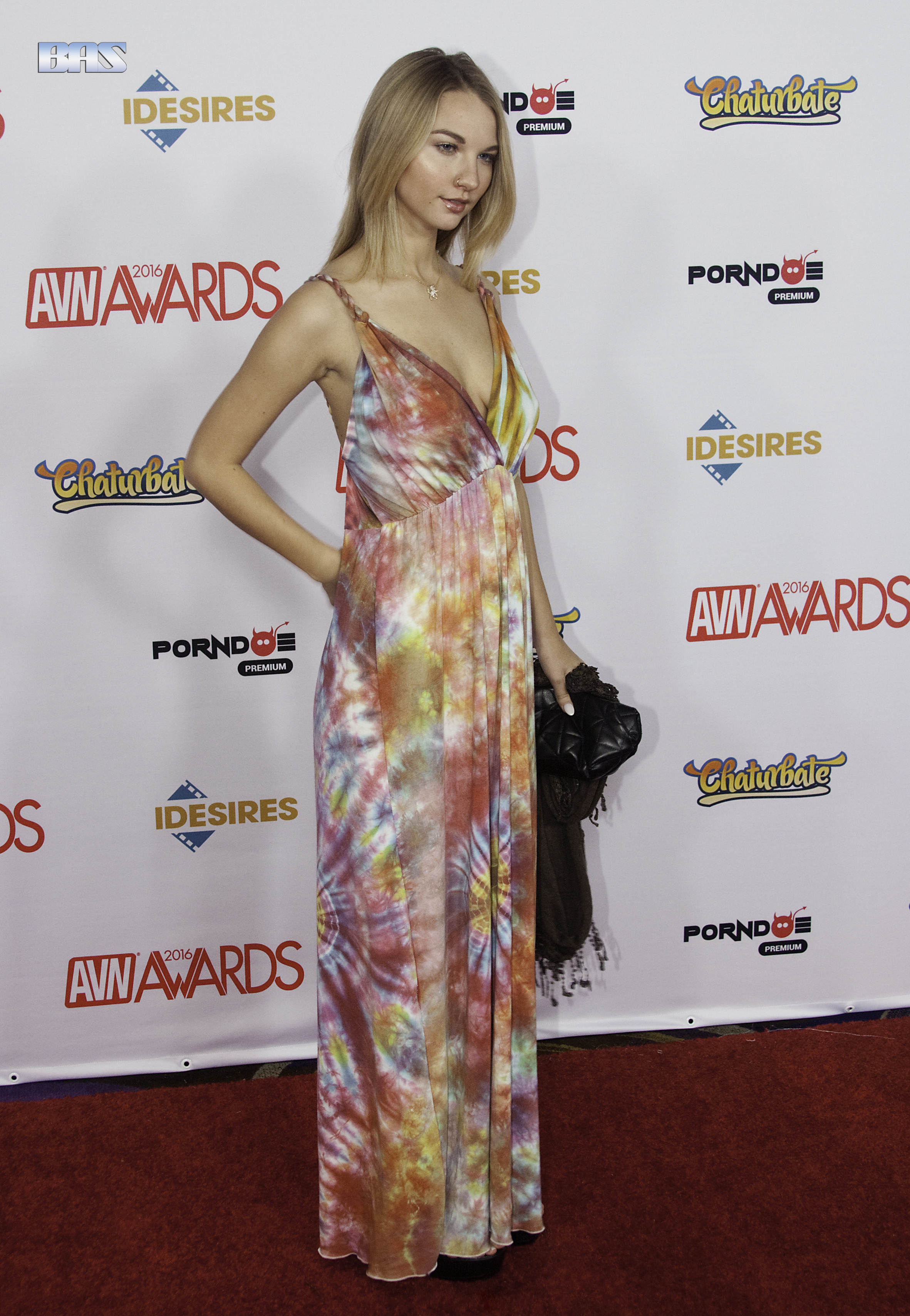 AVN16_0027bas